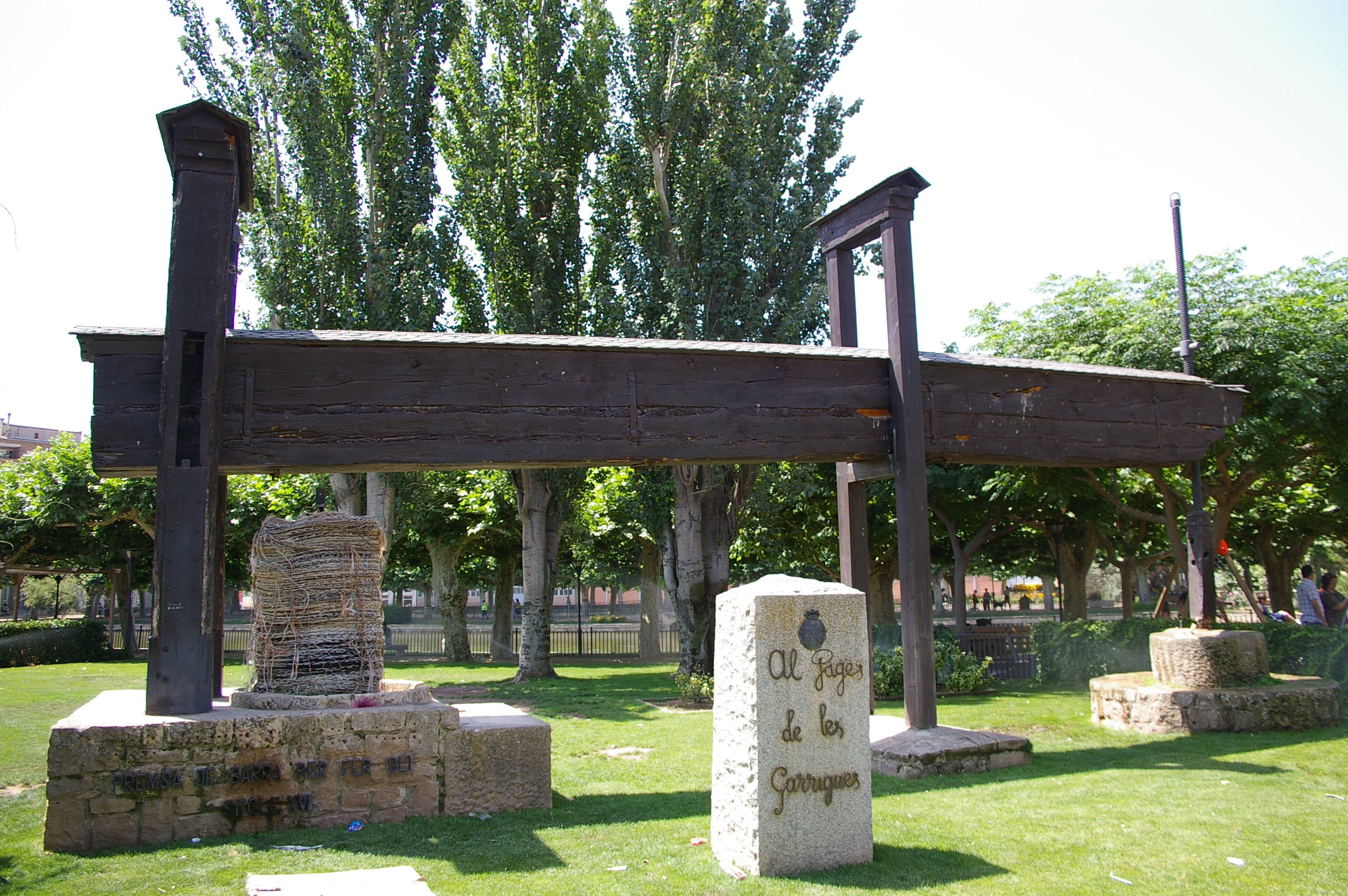 Monument al pagès de les Garrigues. Parc de les Borges Blanques.